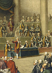 Ouverture des États généraux de 1789 à Versailles, détail d'une peinture d'Auguste Couder (1836) Auguste Couder (1790–1873) Description French painter Date of birth/death1 April 179021 July 1873Location of birth/deathParisParisWork locationParisAuthority control VIAF: 61536237 LCCN: nr91029501 GND: 116696486 BnF: cb107045779 ULAN: 500011490 ISNI: 0000 0000 6641 8515 WorldCat